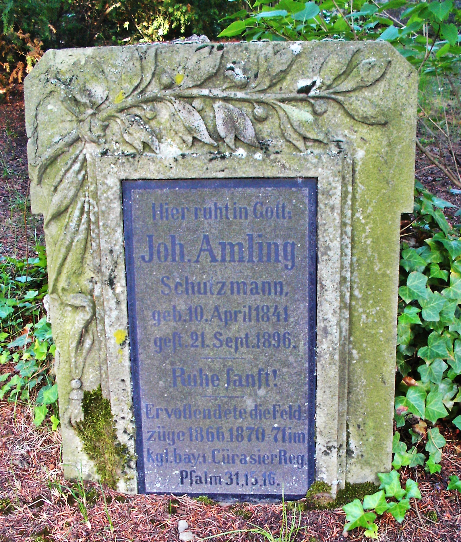 Hauptfriedhof Neustadt an der Weinstraße. Grab eines Veteranen 1866 u. 1870/71 vom 1. Bay. Kürassier-Regiment